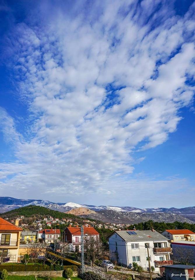 Naselje Buzdohanj, u pozadini se vidi Cernik te dijelom i tzv. grobničke Alpe